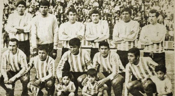 Club Mariscal Santa Cruz Campeon de la Recopa Sudamericana de Clubes 1970.